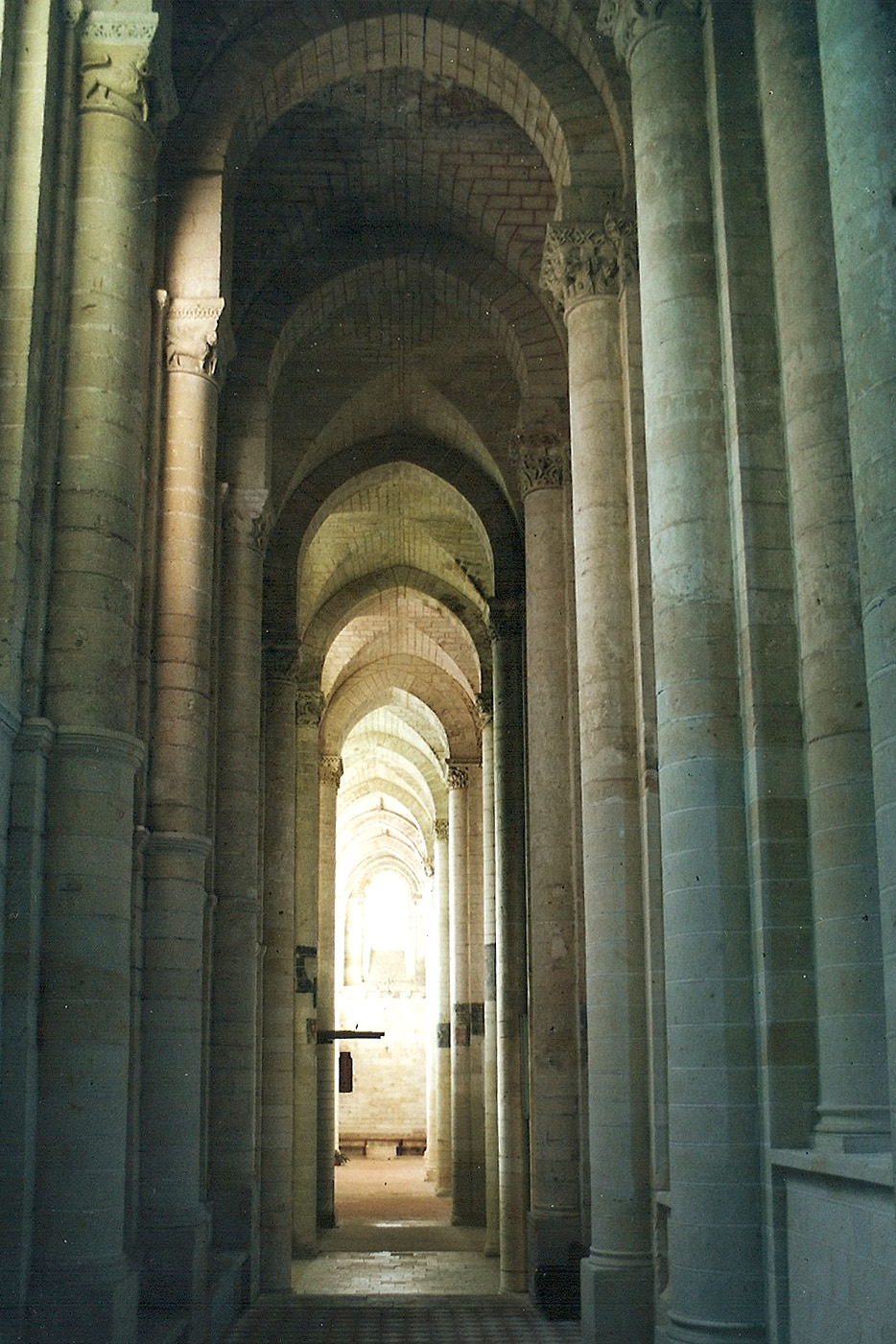 N.-D. Cunault, Südl. Seitenschiff und Umgang